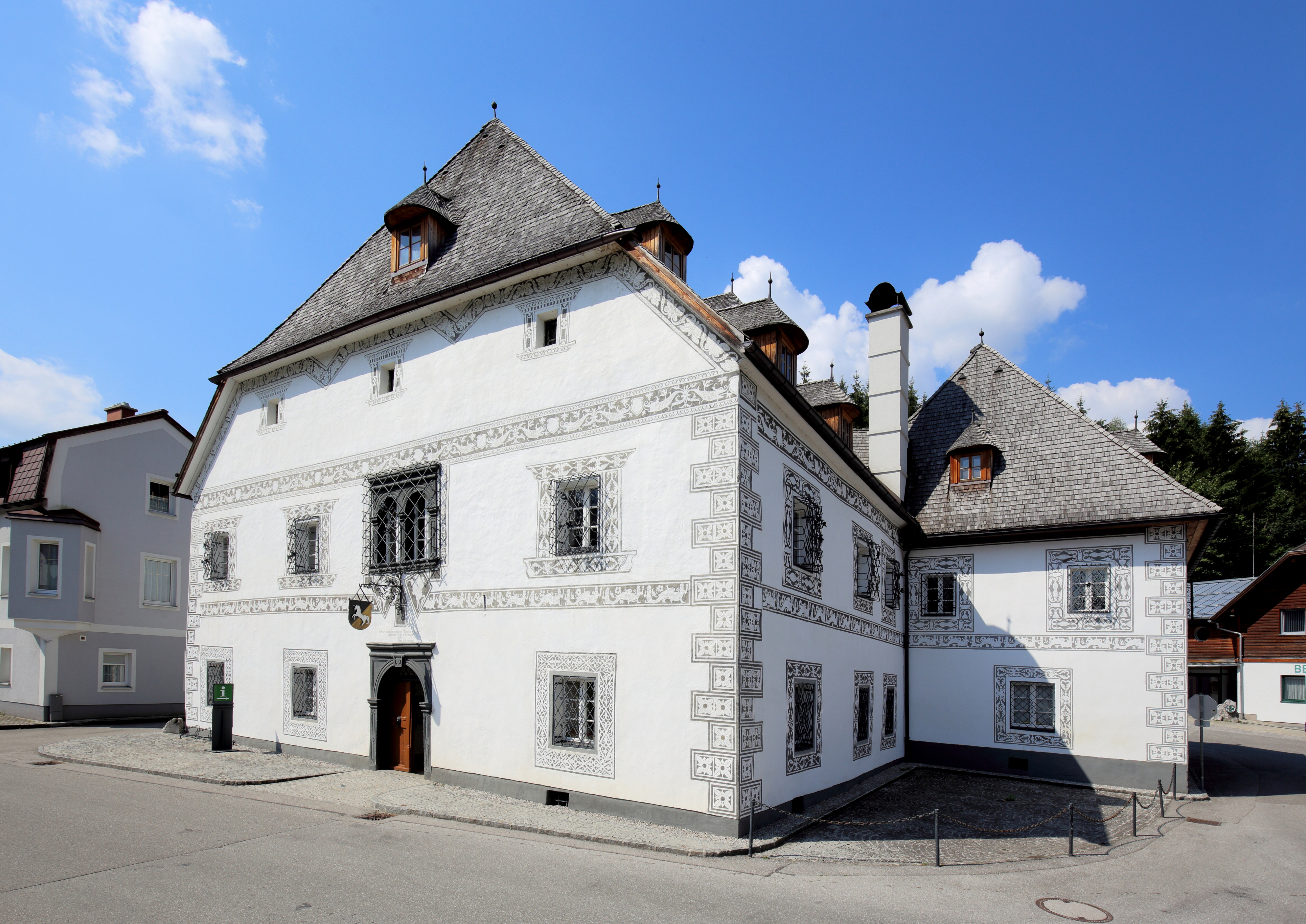 Das sogenannte Amonhaus in der niederösterreichischen Marktgemeinde Lunz am See.Ein frühneuzeitliches ehemaliges Hammerherrenhaus, das 1551 unter dem Hammerherrn Martin Ofner errichtet und um 1600/10 erweitert wurde. Um 1770 kam es in den Besitz der Familie Amon und ist seit 1960/61 im Besitz der Gemeinde, die darin das Gemeindeamt und ein Museum einrichtete.